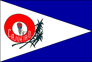 Desenho meu da bandeira da minha cidade